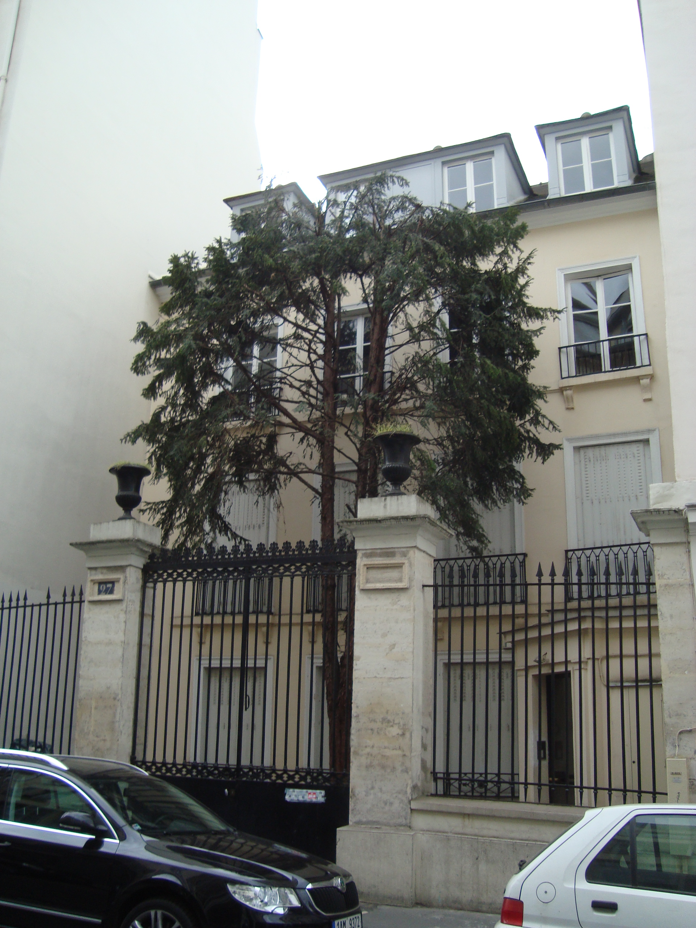 Immeuble historique (1945-2010) des Éditions du Seuil situé au 27, rue Jacob à Saint-Germain-des-Prés, Paris